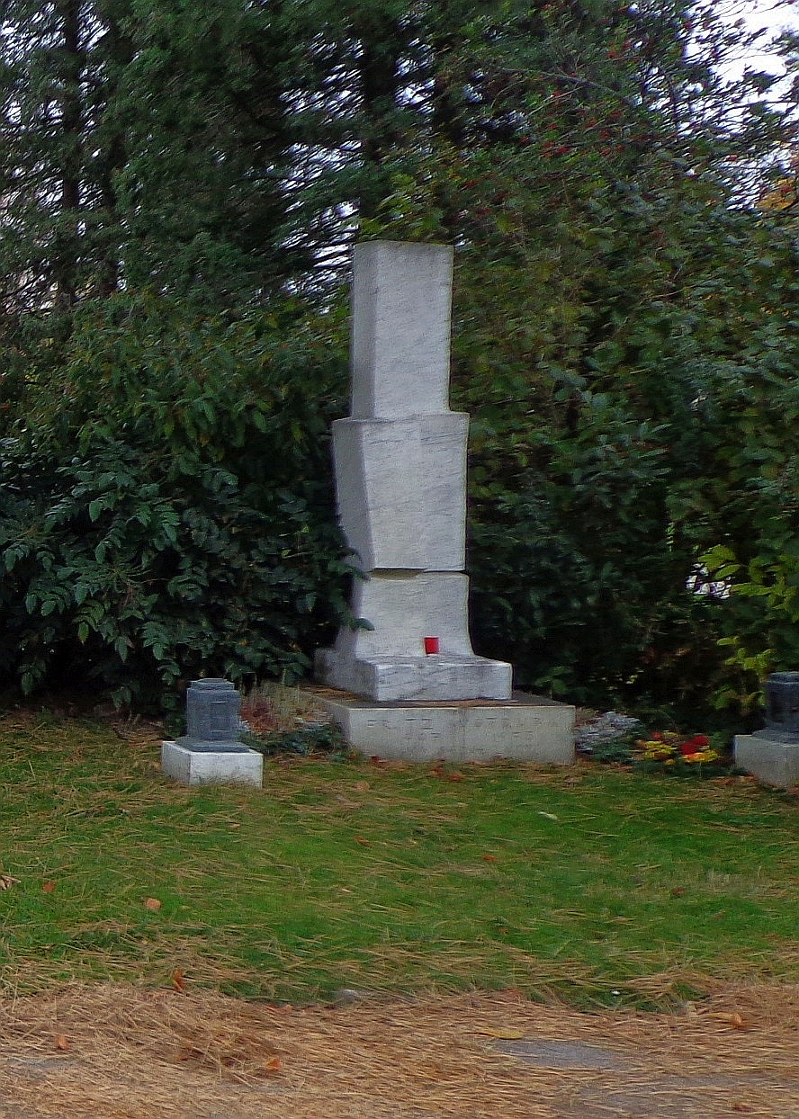 Wiener Zentralfriedhof - Gruppe 32 C, Ehrengrab von Fritz Wotruba